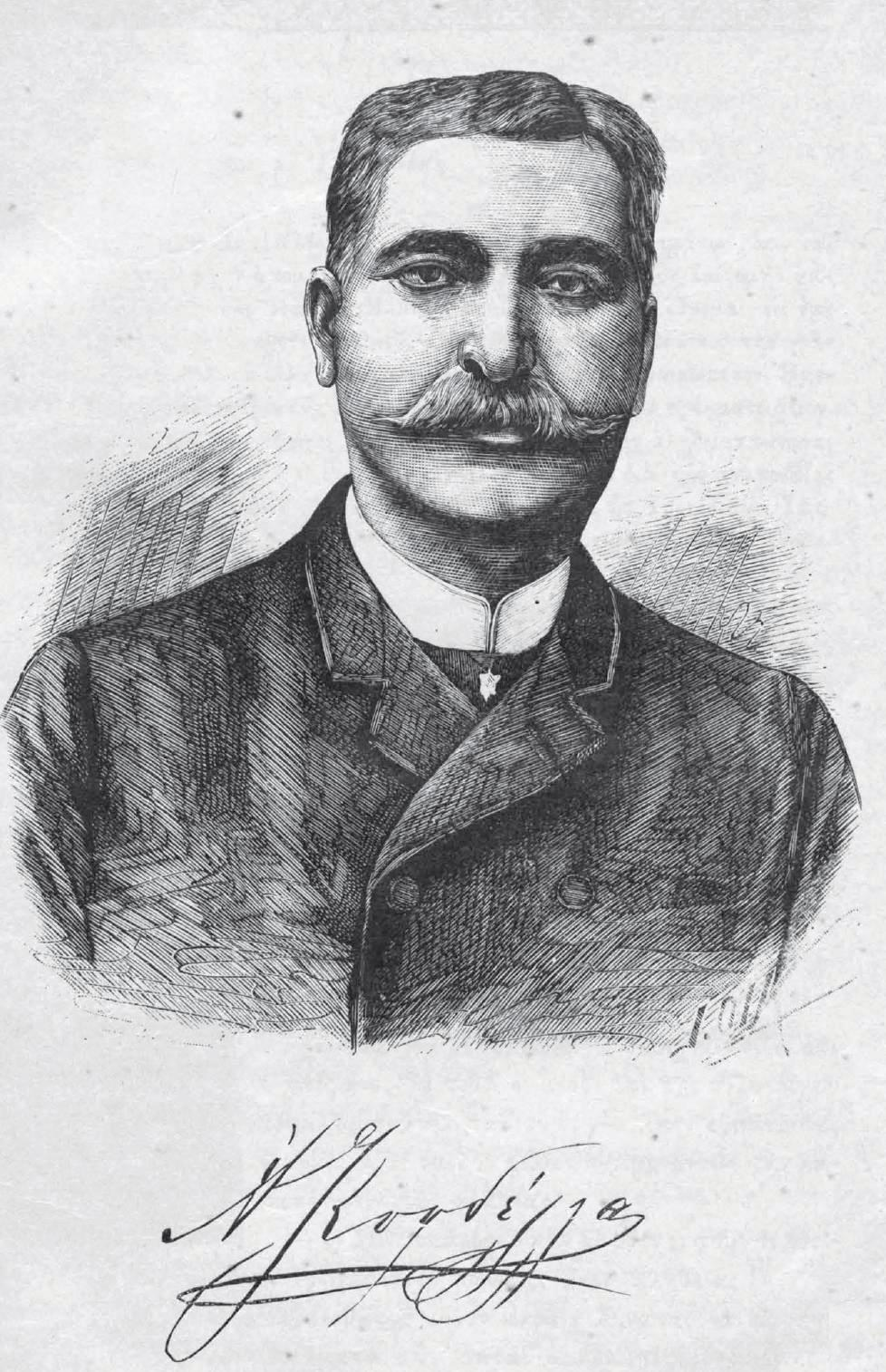 namhafte Griechische Persönlichkeit, 19. Jahrhundert